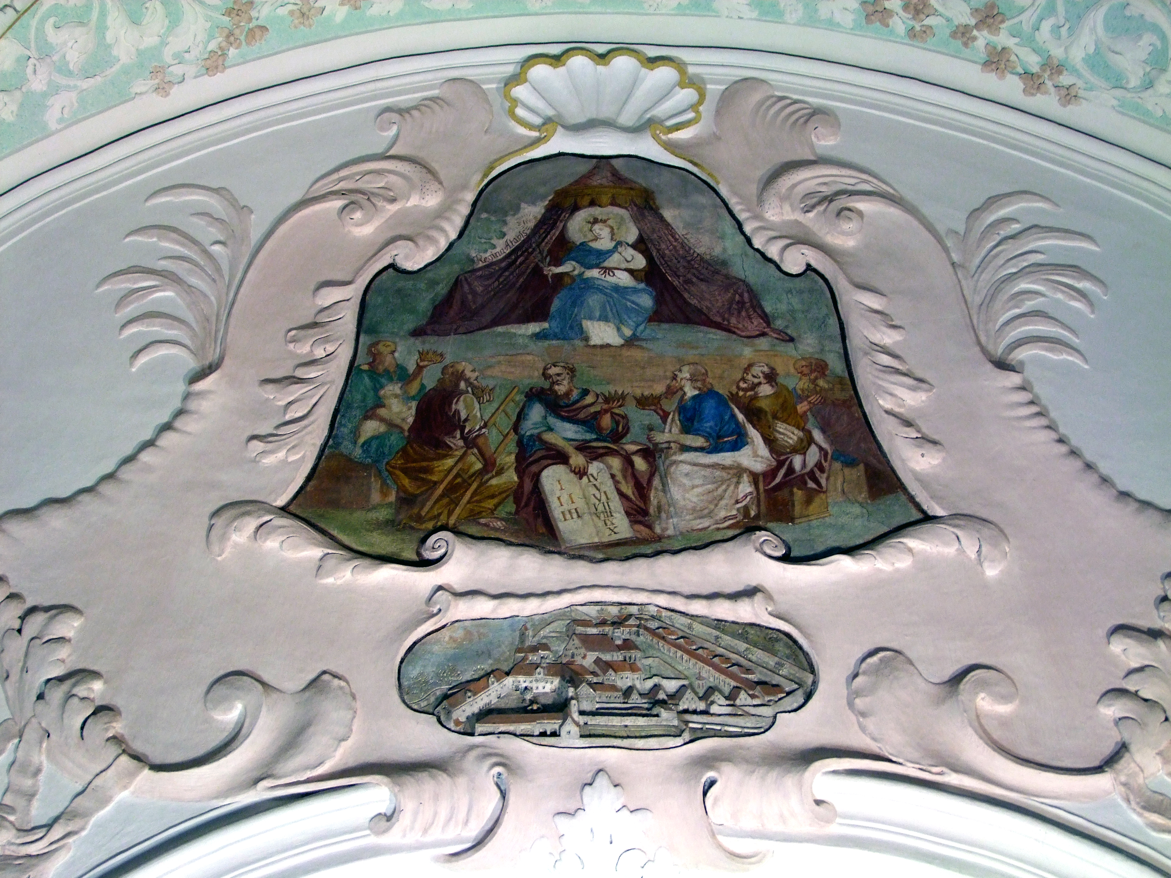 Fresko in der ehemaligen Klosterkirche der Kartause in Buxheim bei Memmingen - OpenStreetMap (Info)